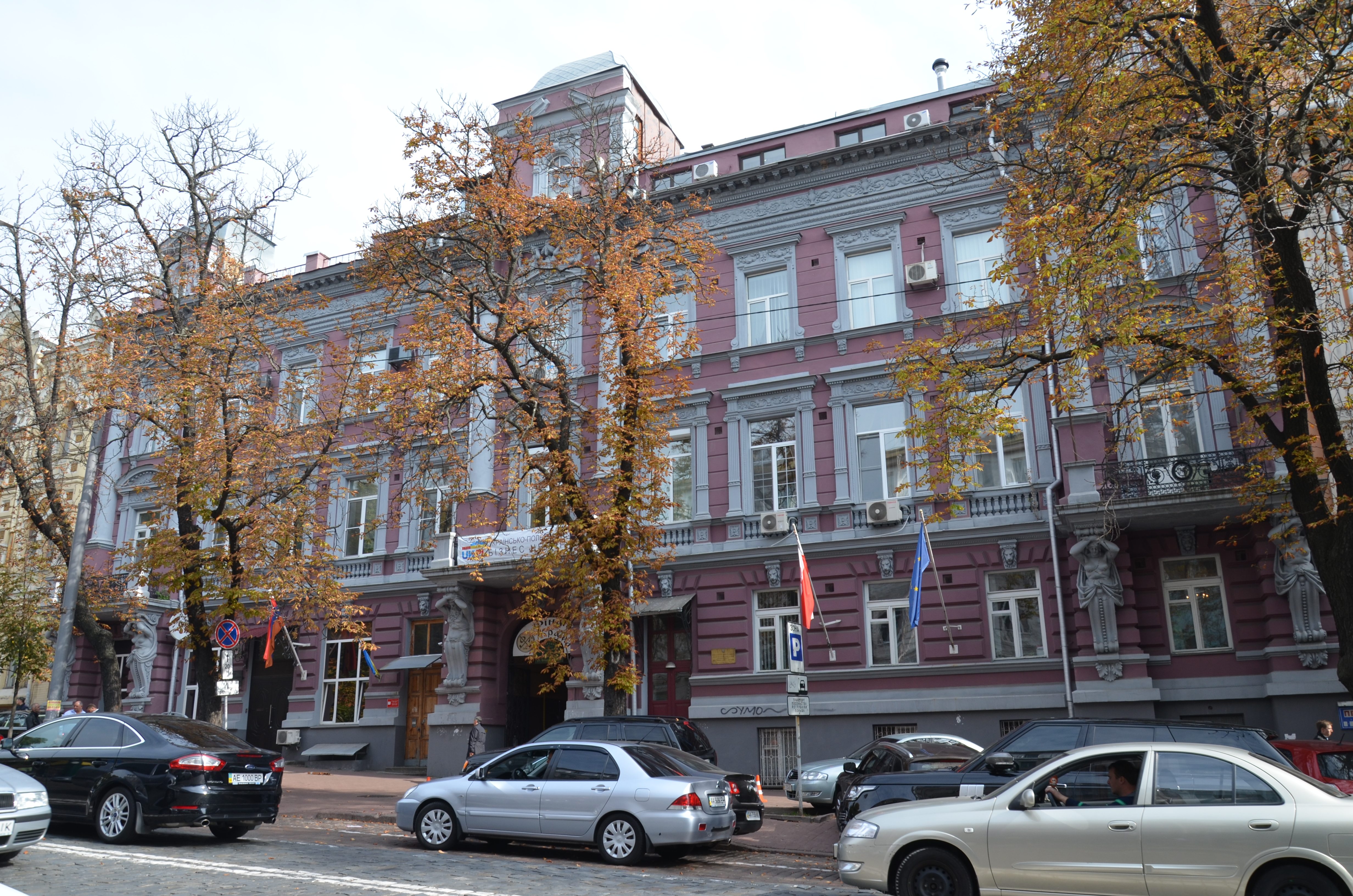 Будинок прибутковий, Київ, Володимирська вул., 45